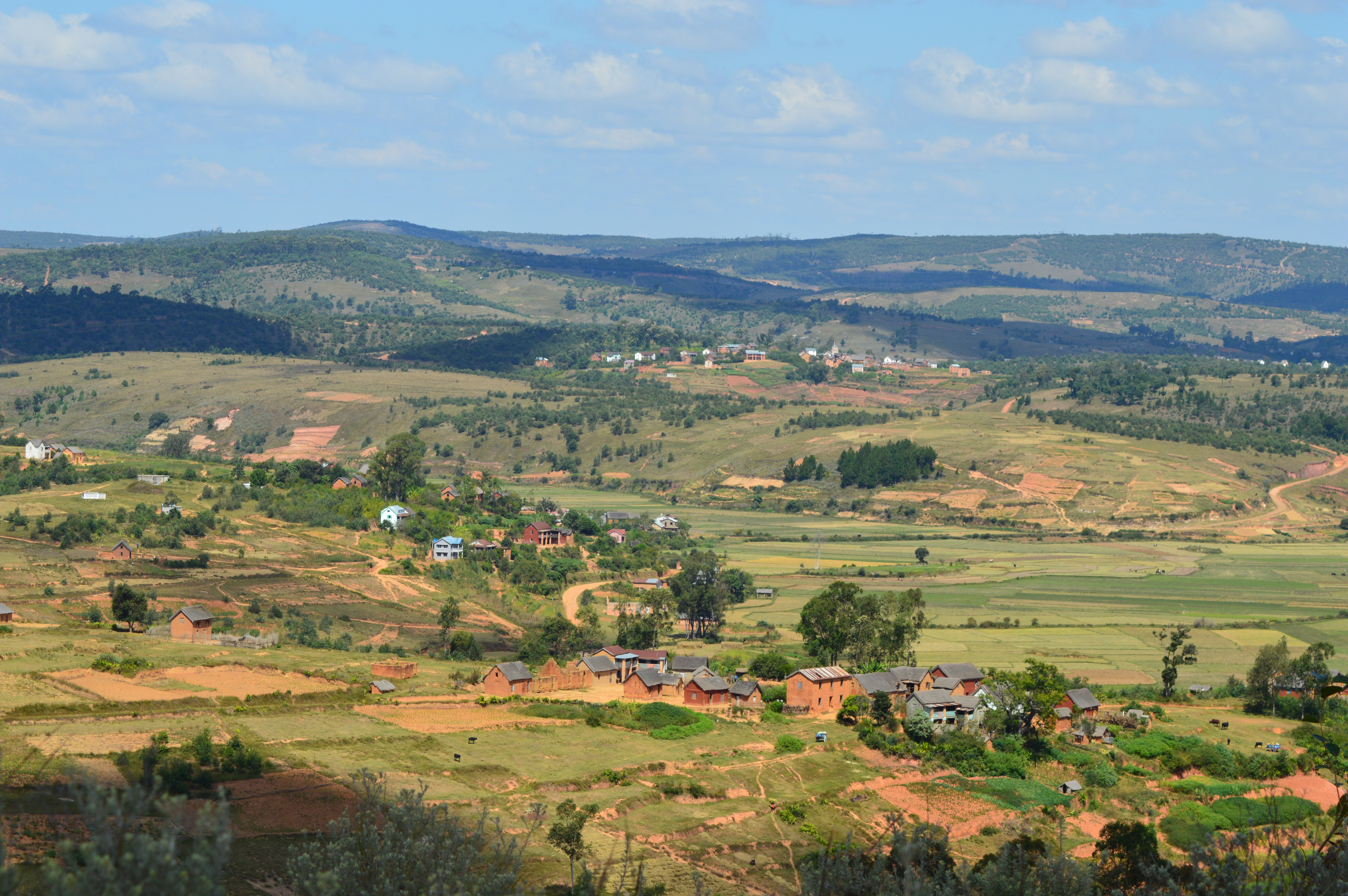 Le petit village d'Ambohitrolomahitsy